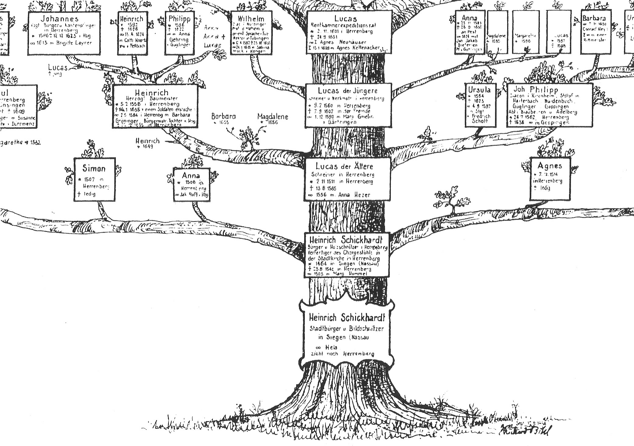 Stammbaum der Familie Schickhardt (Fragment eines Holzschnitts)